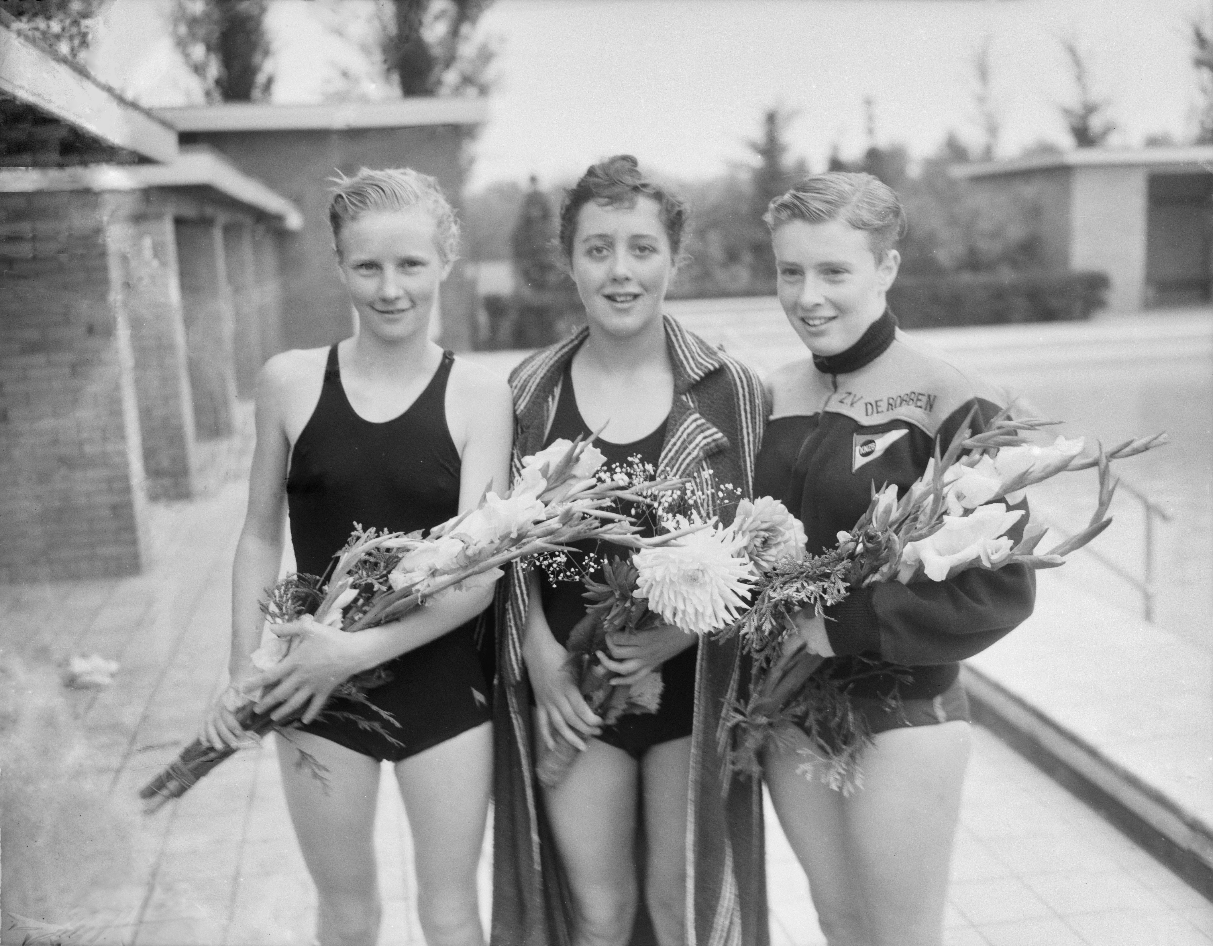 Collectie / Archief : Fotocollectie Anefo Reportage / Serie : [ onbekend ] Beschrijving : Nationale zwemkampioenschappen Amsterdam, start 100 meter rugslag dames. Mary Kok, Jans Koster en Corrie Schimmel Datum : 2 september 1956 Locatie : Amsterdam, Noord-Holland Trefwoorden : bloemen, kampioenschappen, vrouwen, zwemmen Persoonsnaam : Kok, Mary, Koster, Jans, Schimmel, Corrie Fotograaf : Noske, J.D. / Anefo Auteursrechthebbende : Nationaal Archief Materiaalsoort : Negatief (zwart/wit) Nummer archiefinventaris : bekijk toegang 2.24.01.04 Bestanddeelnummer : 907-9766